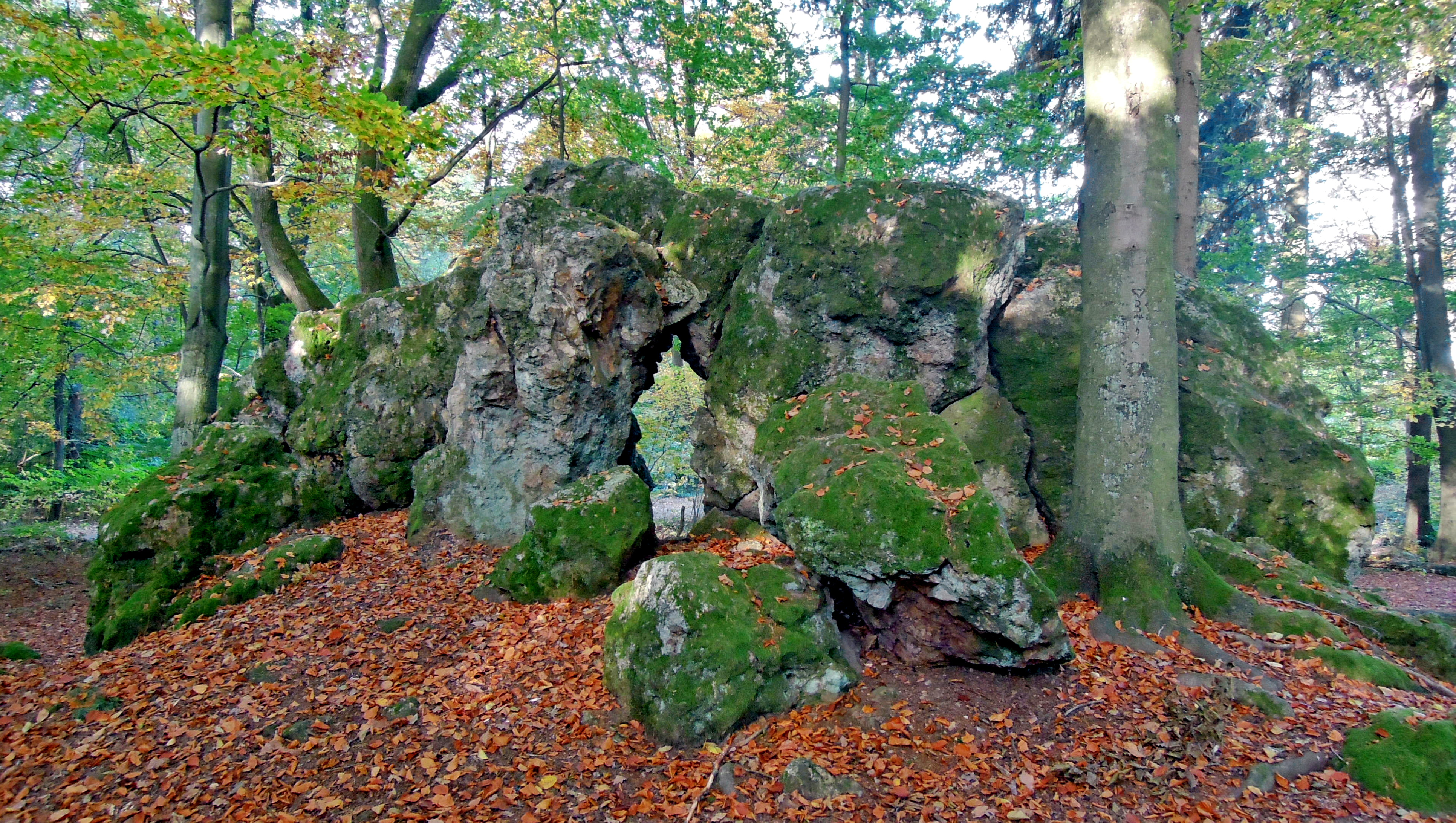 Keltische Kultstätte am Litermont